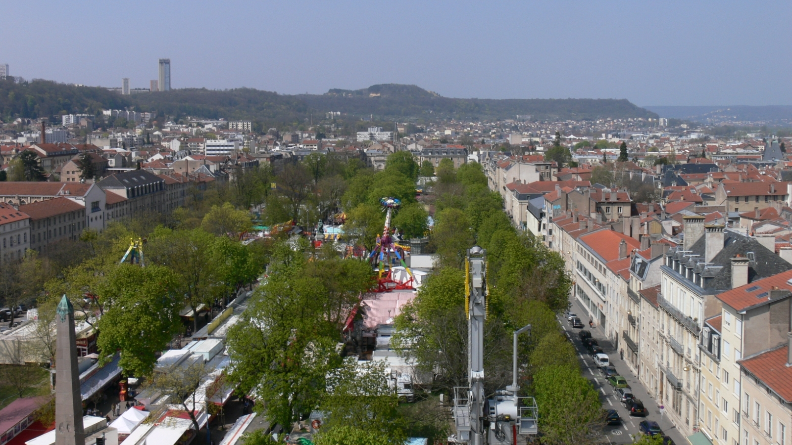 Foire de Nancy 2010 - Vue sur le Cours Léopold depuis la grande-roue.